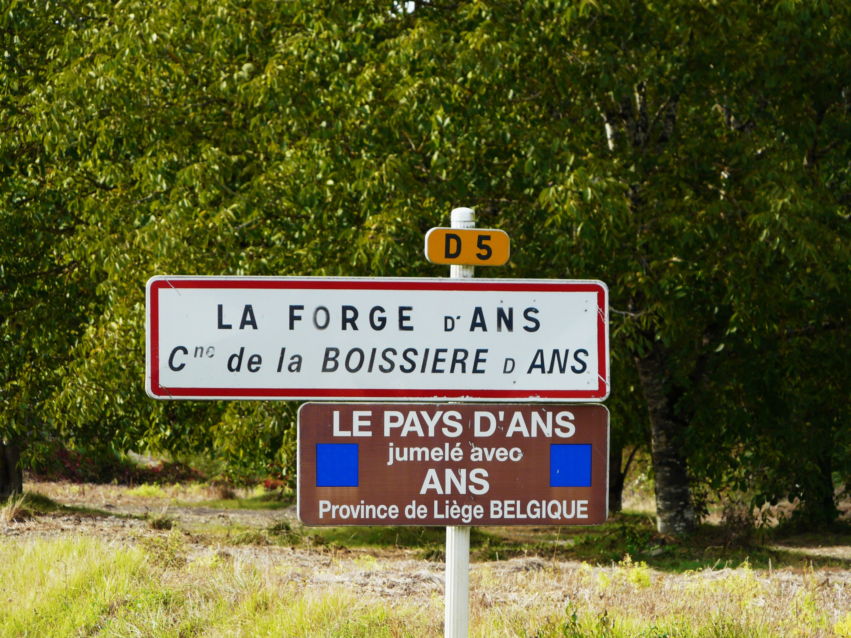 Panneau de jumelage de La Boissière-d'Ans, Dordogne, France.